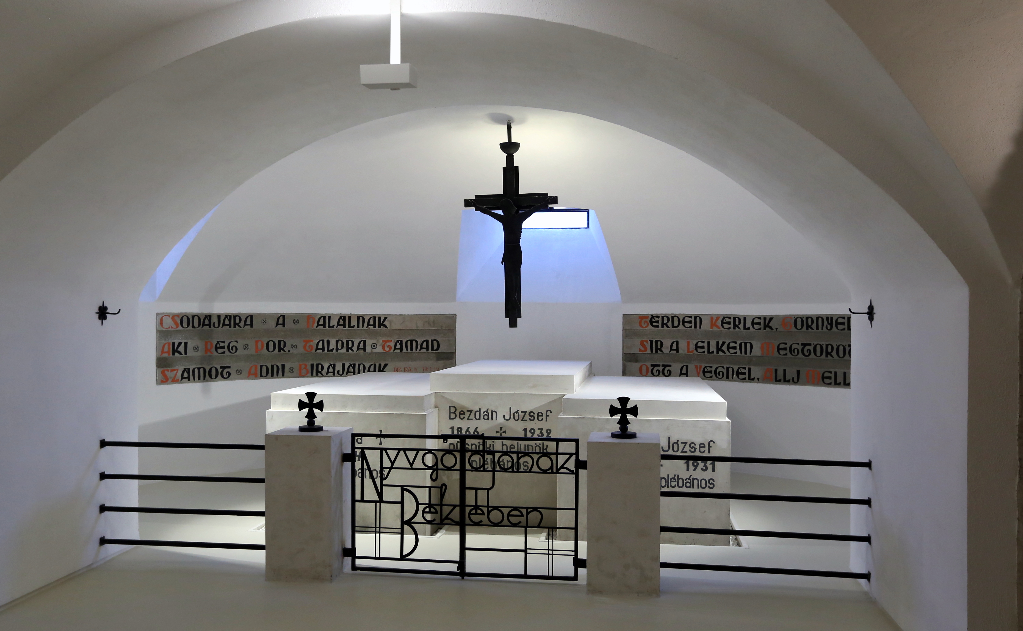 Bezdán József sírja a Szegedi Dóm altemplomában.